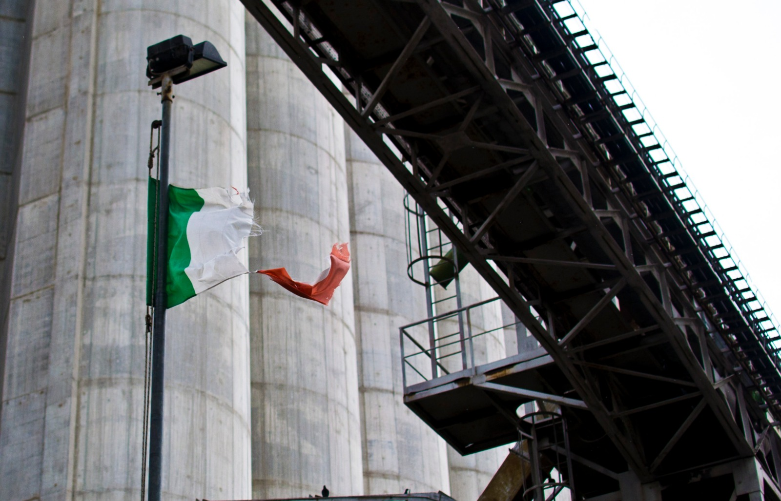 Porto di Torre Annunziata